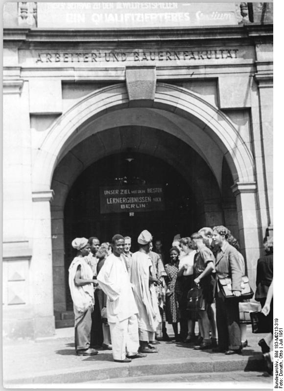 ADN-ZB Donath-Sei-Schm-Vorbereitung zu den III.Weltfestspiele der Jugend und Studenten in Berlin 1951 UBz: Studenten, aus Nigeria, die an der Arbeiter und Bauernfakultät in Leipzig studieren und an den III.Weltfestspielen in Berlin teilnehmen werden.Juli 1951